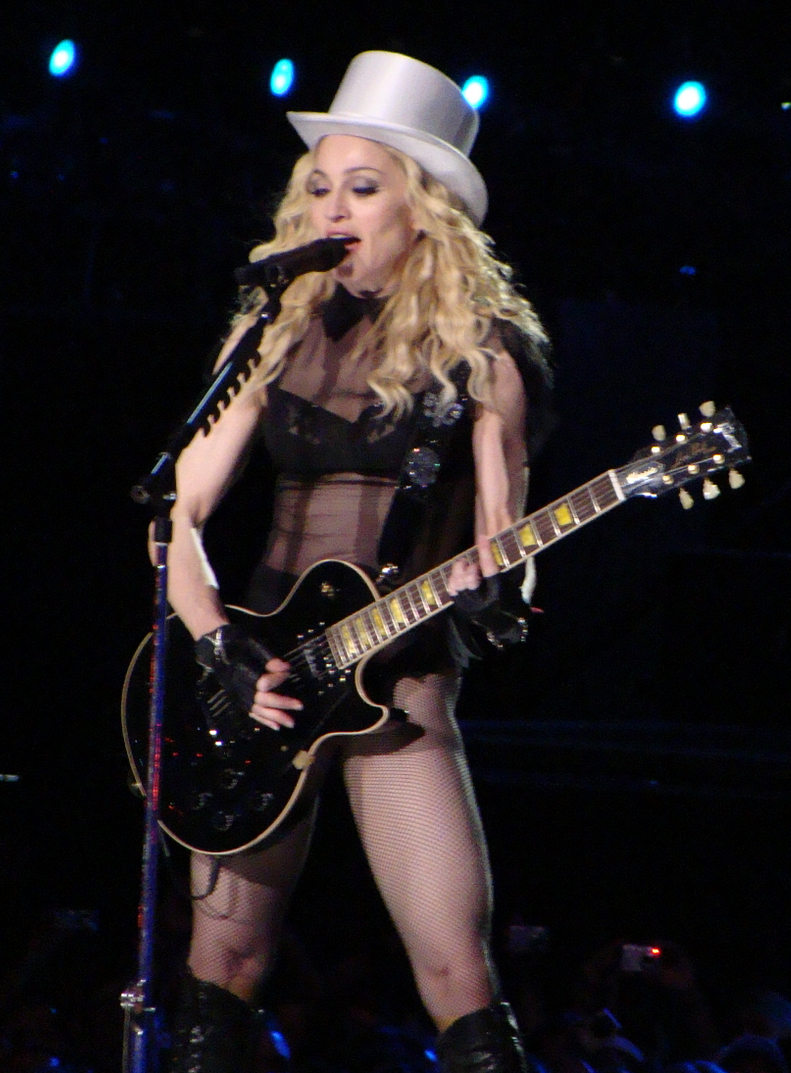 Madonna concert 2008